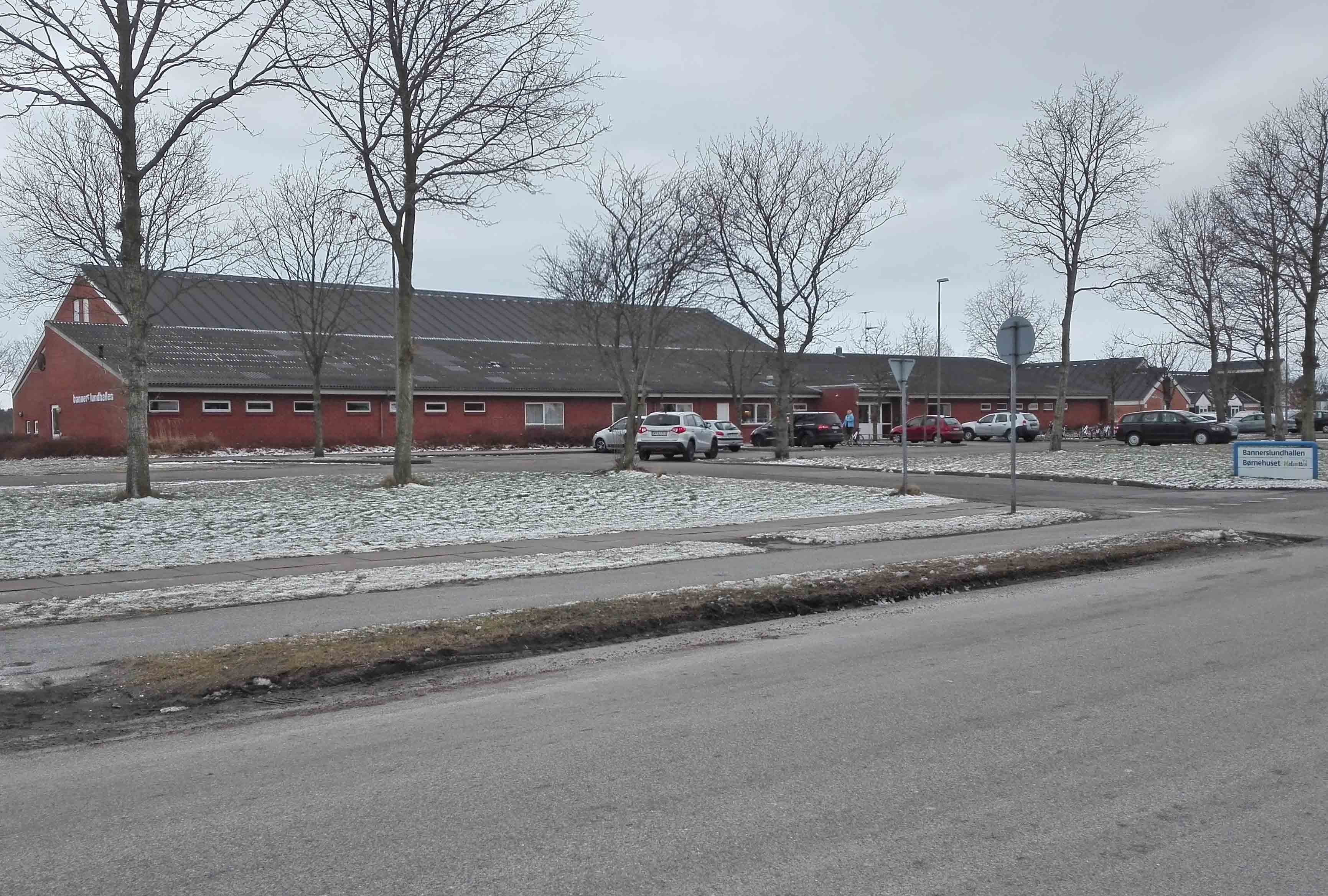 Bannerslundhallen i Elling